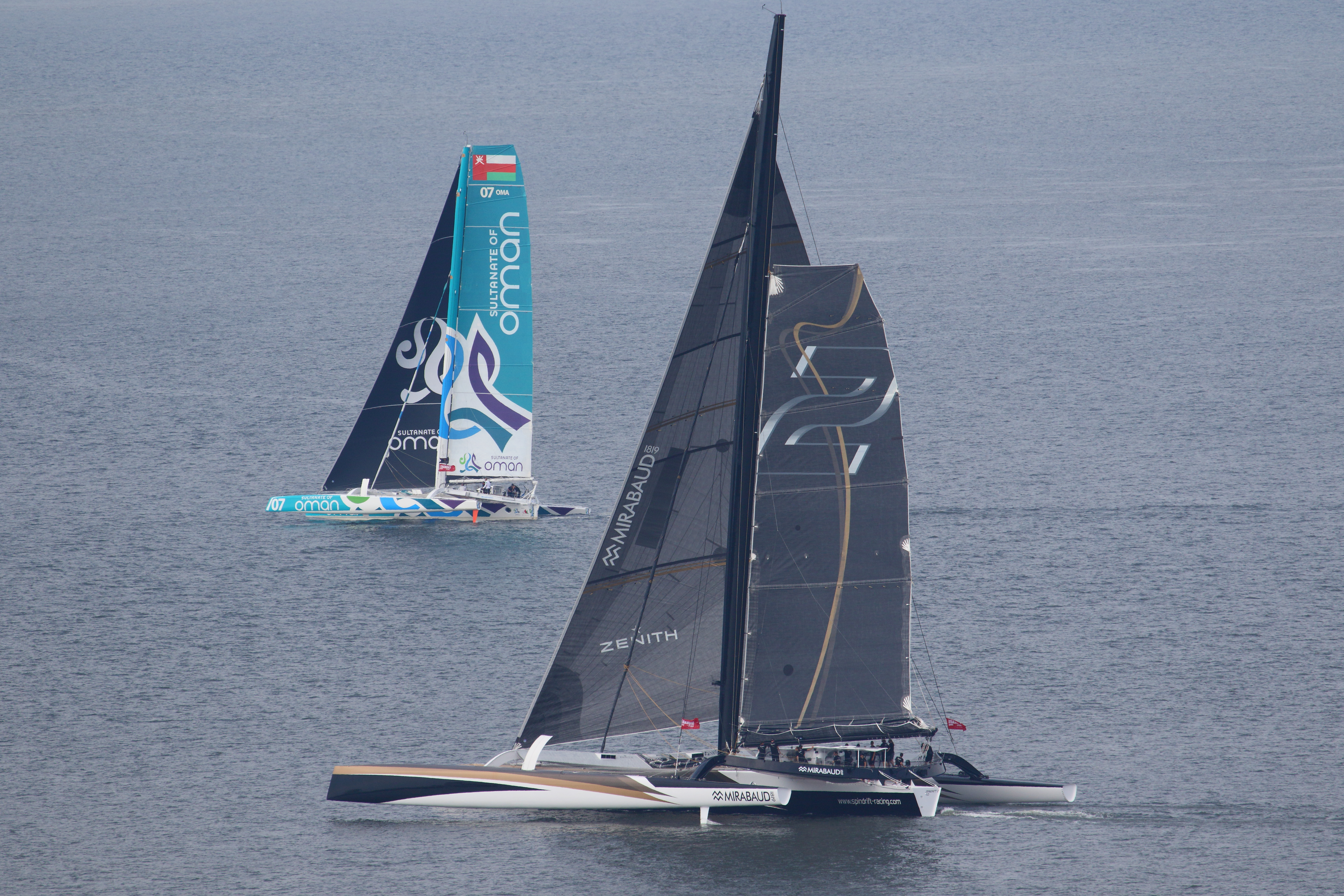 SPINDRIFT 2 et Musandam-Oman Sail au départ de la Transat Québec-Saint-Malo